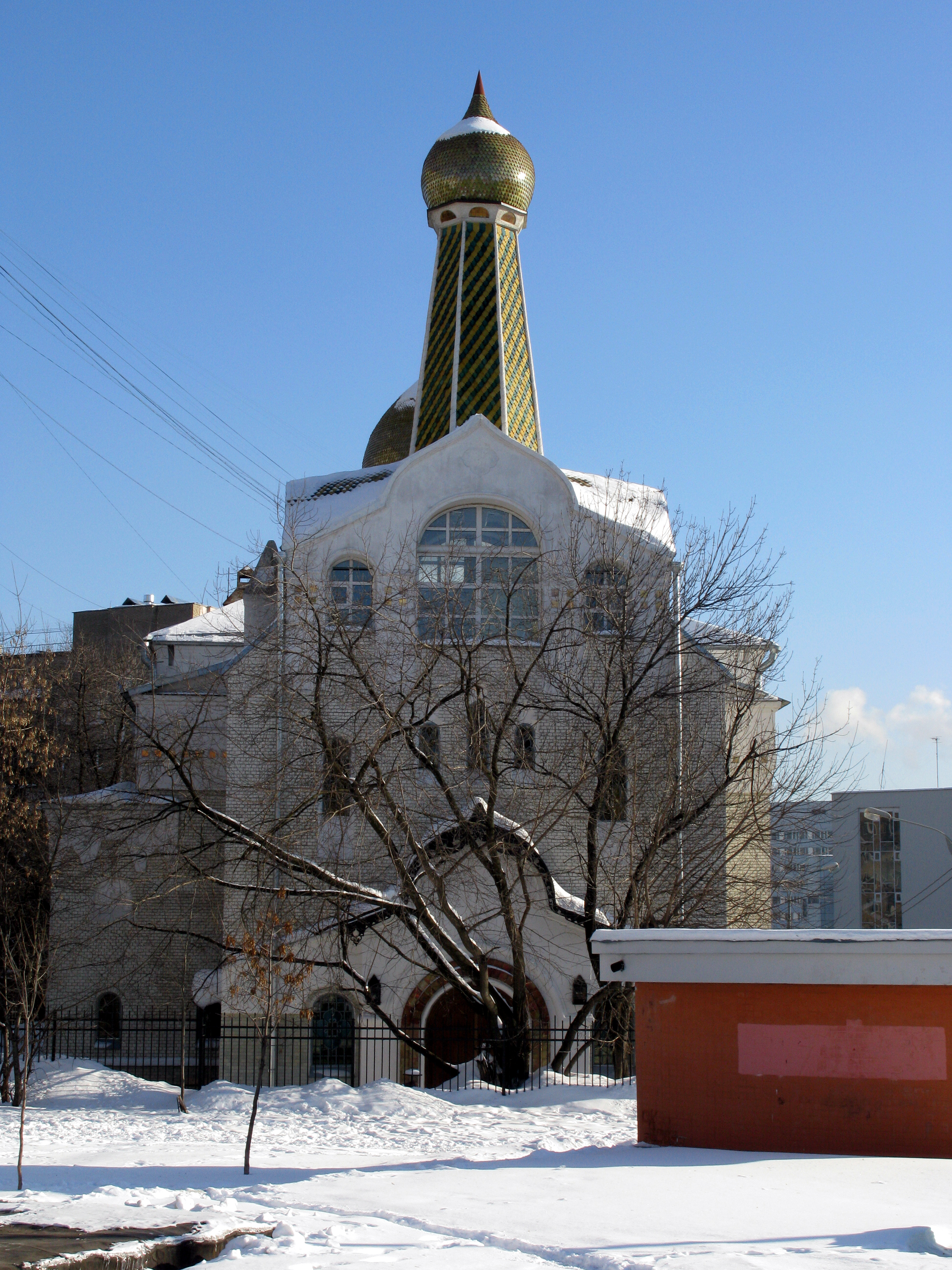 Старообрядческая церковь Покрова Пресвятой Богородицы Покрово-Успенской общины